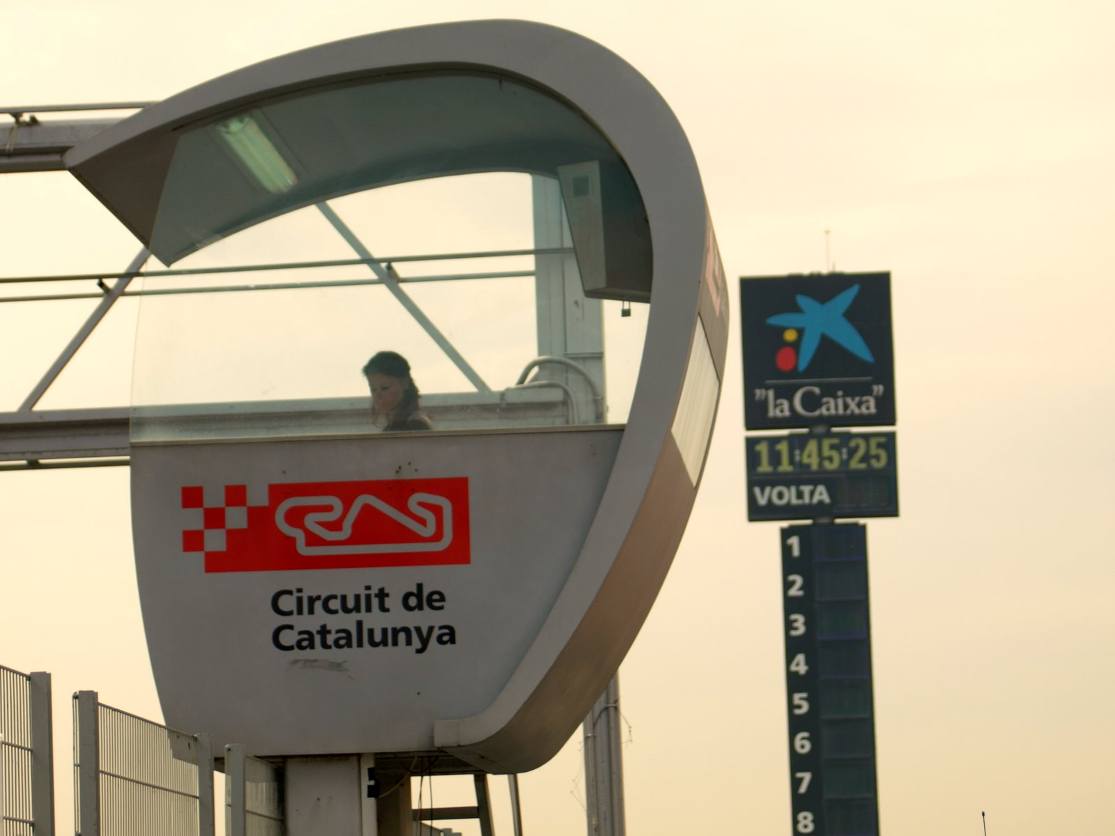 Puesto de control en el Circuit de Catalunya.